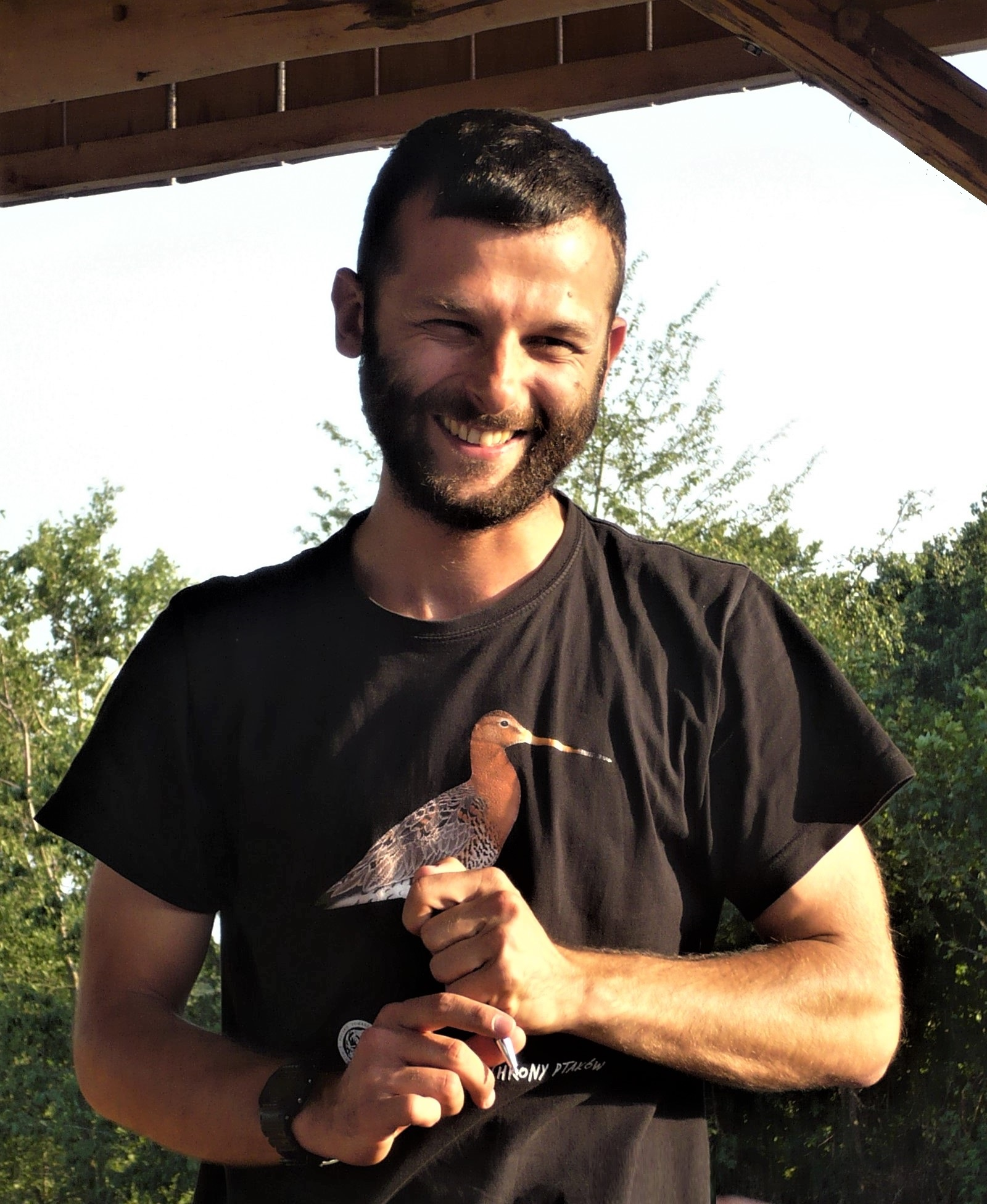 Stanisławem Łubieński, Festiwal Góry Literatury, 2018.